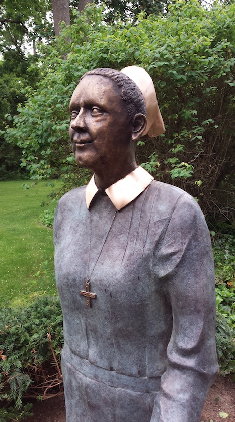 Denkmal einer Diakonisse auf dem Kirchvorplatz der Diakoniekirche Bad Kreuznach. Das Denkmal steht im öffentlichen Raum und wurde durch den Künstler Gernot Meyer-Grönhof gestaltet.